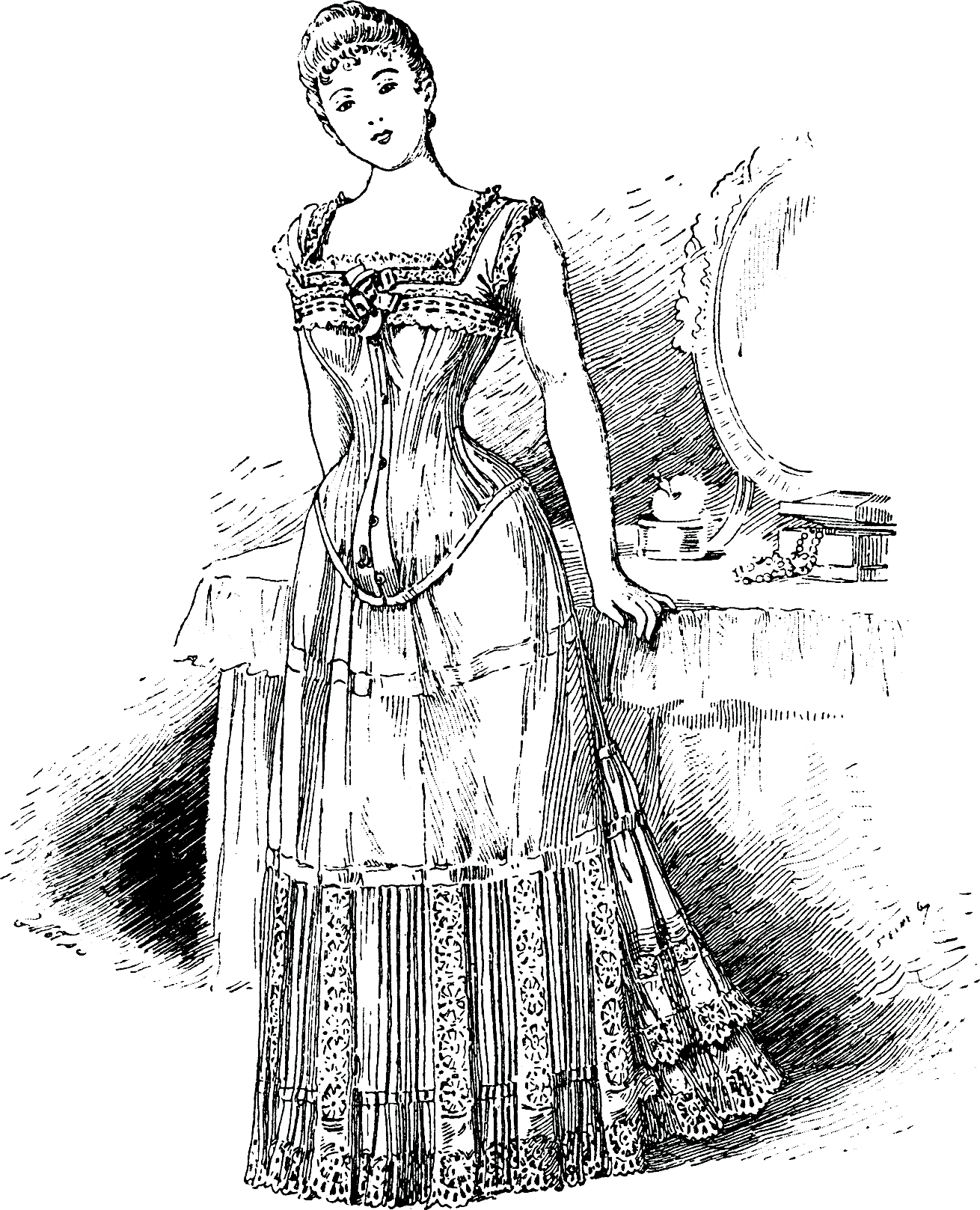 Fig. Pl. XIII — Corset Léoty (1878).